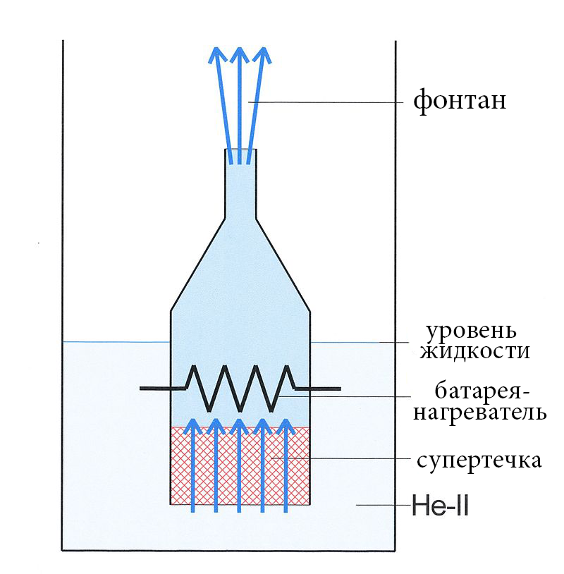 Helium fountain 01